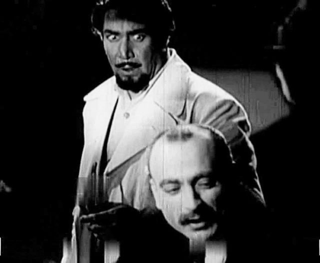 الممثلان يوسف وهبي ومحمود المليجي في لقطة من فيلم سيف الجلَّاد 1944م.